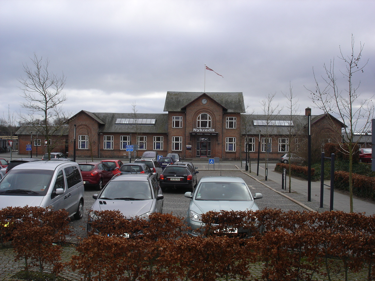 Grenaa Station fra vejsiden